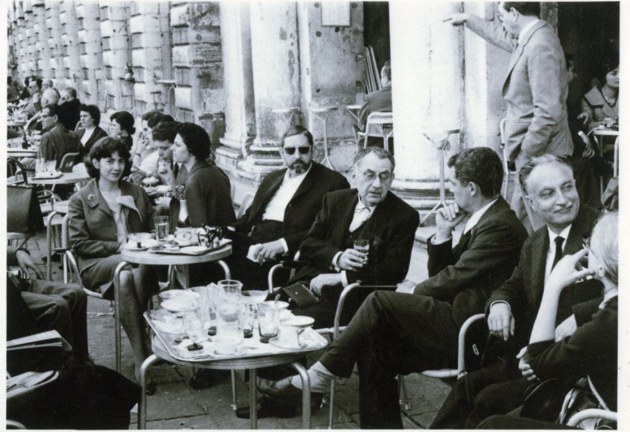 Serie fotografica : Italia, 1982 / Walter Boje, Renzo Tortelli, Publifoto. - Stampe: 4 : Positivo b/n, gelatina bromuro d'argento/ carta, 10x14, 13x18, 17x22. - ((Al verso delle stampe iscrizioni didascaliche, documentarie e di responsabilità manoscritte a matita e a penna: "3° biennale/ da destra P. Monti - U. Mulas/ Man Ray - Fritz Gruber/ Foto Dr. Walter Boje/ Brückenstr. 17", "Premio Nazionale Zanotti Bianco 1978"; timbri a inchiostro con copyright: "Renzo Tortelli", "Publifoto/ [...] Via Parma 5b - Roma". - Sul coperchio della scatola iscrizione didascalica manoscritta a penna: "Sicilia/ n. 30 fotografie di Enzo Sellerio/ (1963 ca.)". - Nel 1980 Paolo Monti riceve Premio Nazionale Zanotti Bianco, istituito nel 1964 da Italia Nostra, attribuito a coloro che si sono distinti nella difesa dei beni culturali e dell'ambiente. . - La donna ritratta a Venezia insieme a Paolo Monti, Mulas e Man Ray è presumibilmente Maria Mulas.